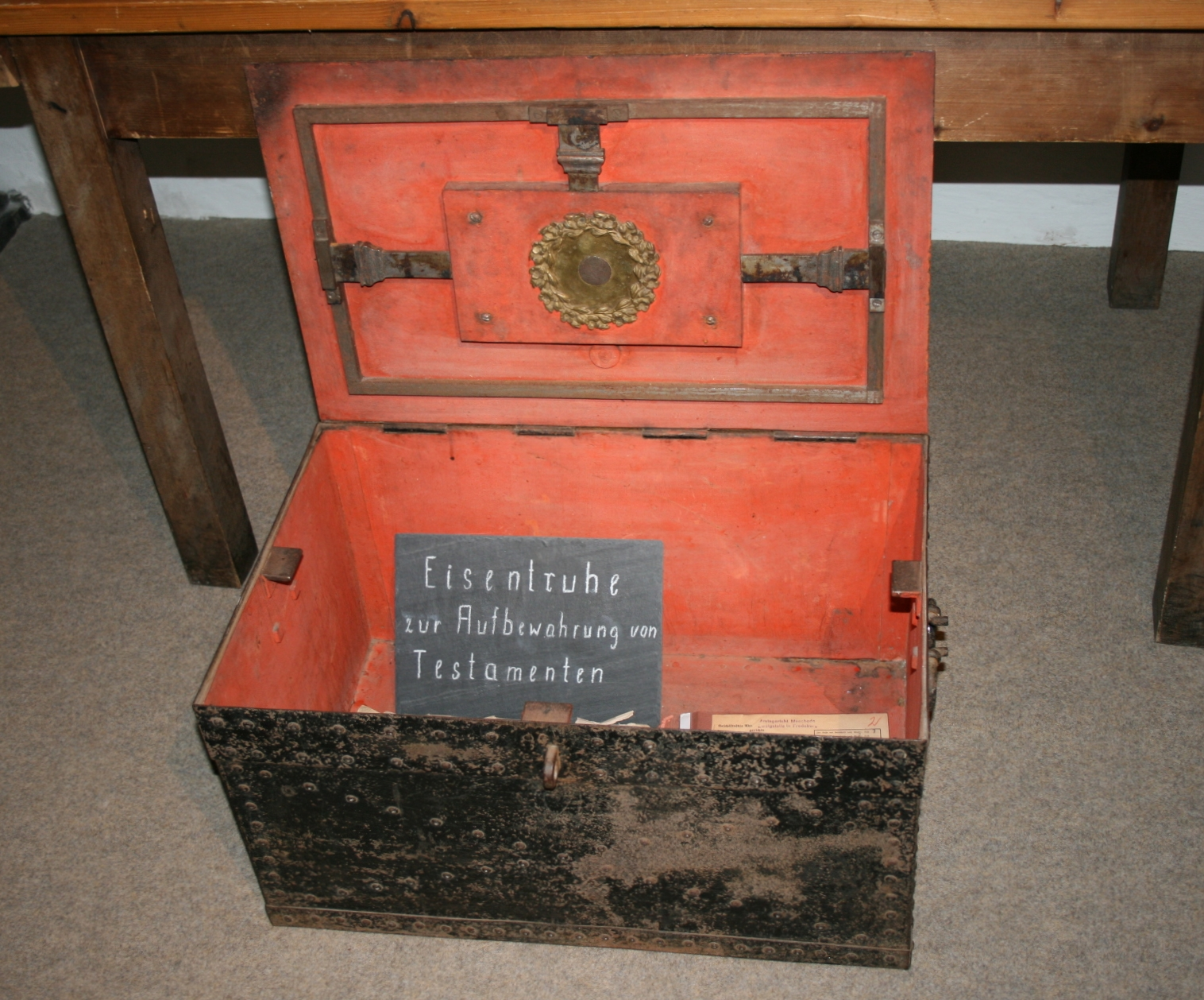 Eisentruhe zur Aufbewahrung von Testamenten im Gerichtsmuseum Bad Fredeburg in Schmallenberg.